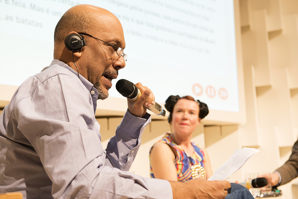 Alemanha | A participação do Brasil na Feira de Frankfurt se deu por meio dos ministérios da Cultura e Relações Exteriores, FBN, Fundação Nacional de Artes (Funarte), Câmara Brasileira do Livro, com apoio da Embratur, Agência Brasileira de Promoção de Exportações e Investimentos (Apex-Brasil) e Sesc São Paulo. bit.ly/1clVotx Foto: Johan Visbeek